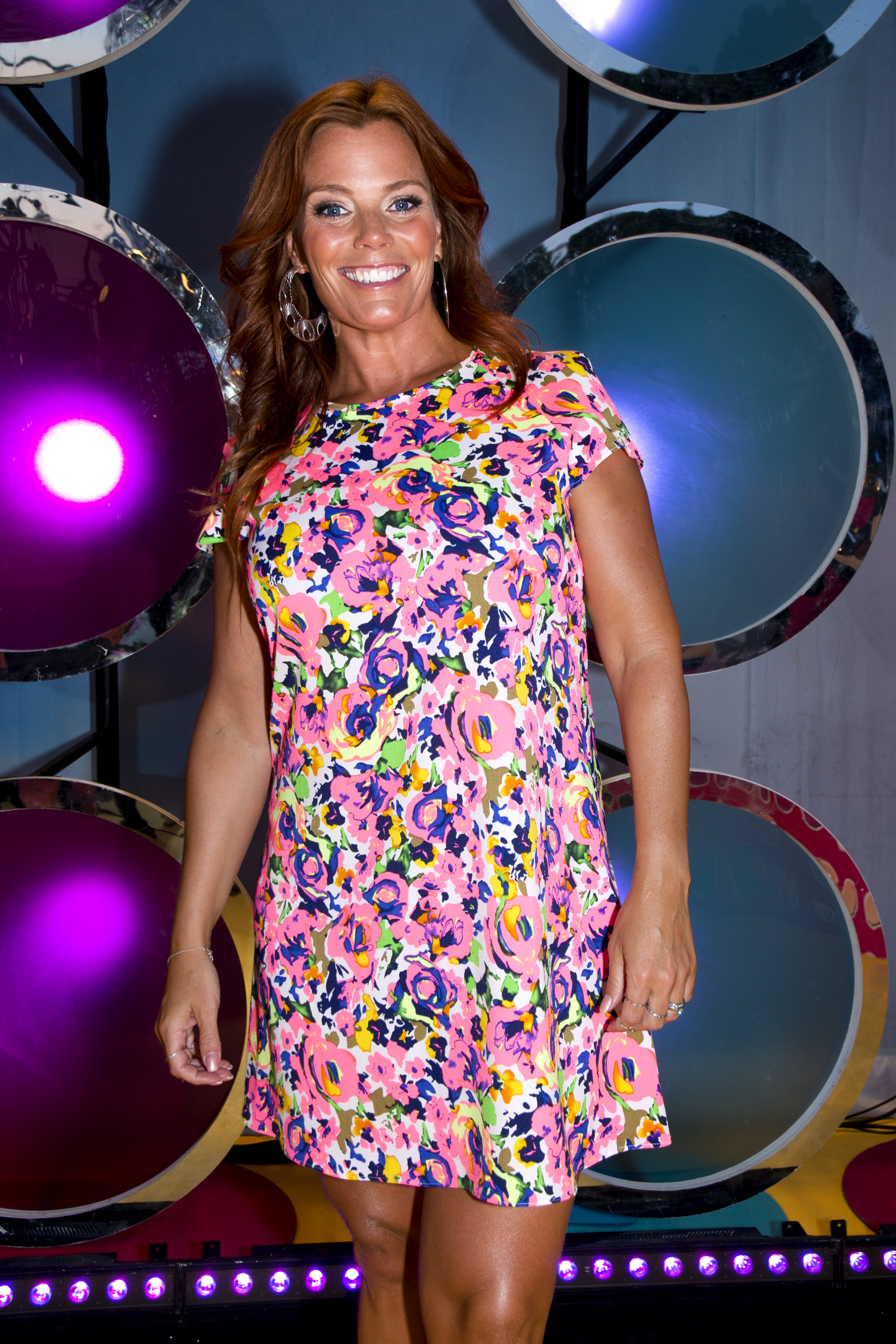 Gry Forssell på Sommarkrysset 2014